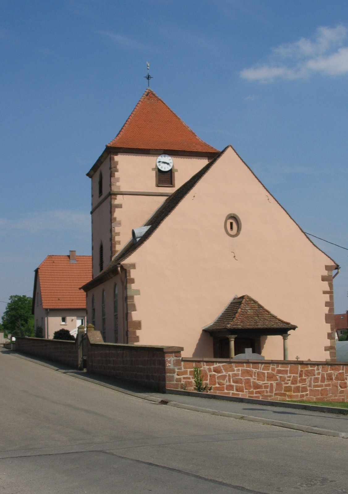 Église Saint Rémi (1784 entièrement rénové en 1994) à Neugartheim, en Alsace.